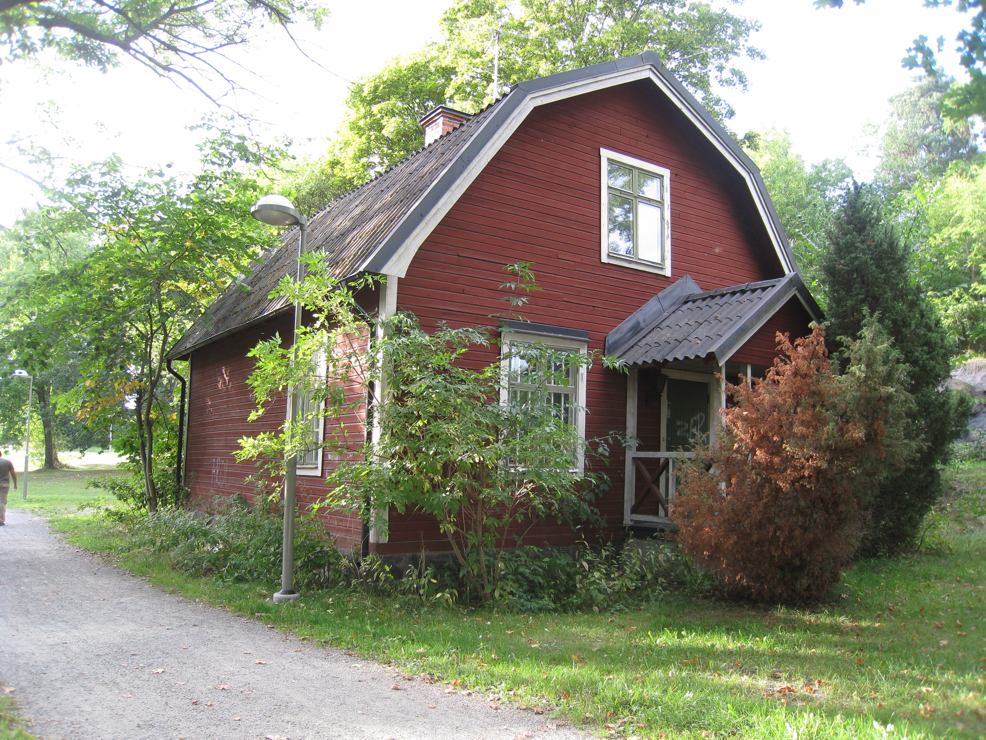 Mejerivillan i Ulvsunda i Bromma i västra Stockholm ligger norr om Ulvsunda slott. Vy från öster. Villan ligger vid den smala kanalen som leder Lillsjön ut i Ulvsundasjön. Huset är från omkring år 1900 och är det enda som återstår av Ulvsunda lantgård.